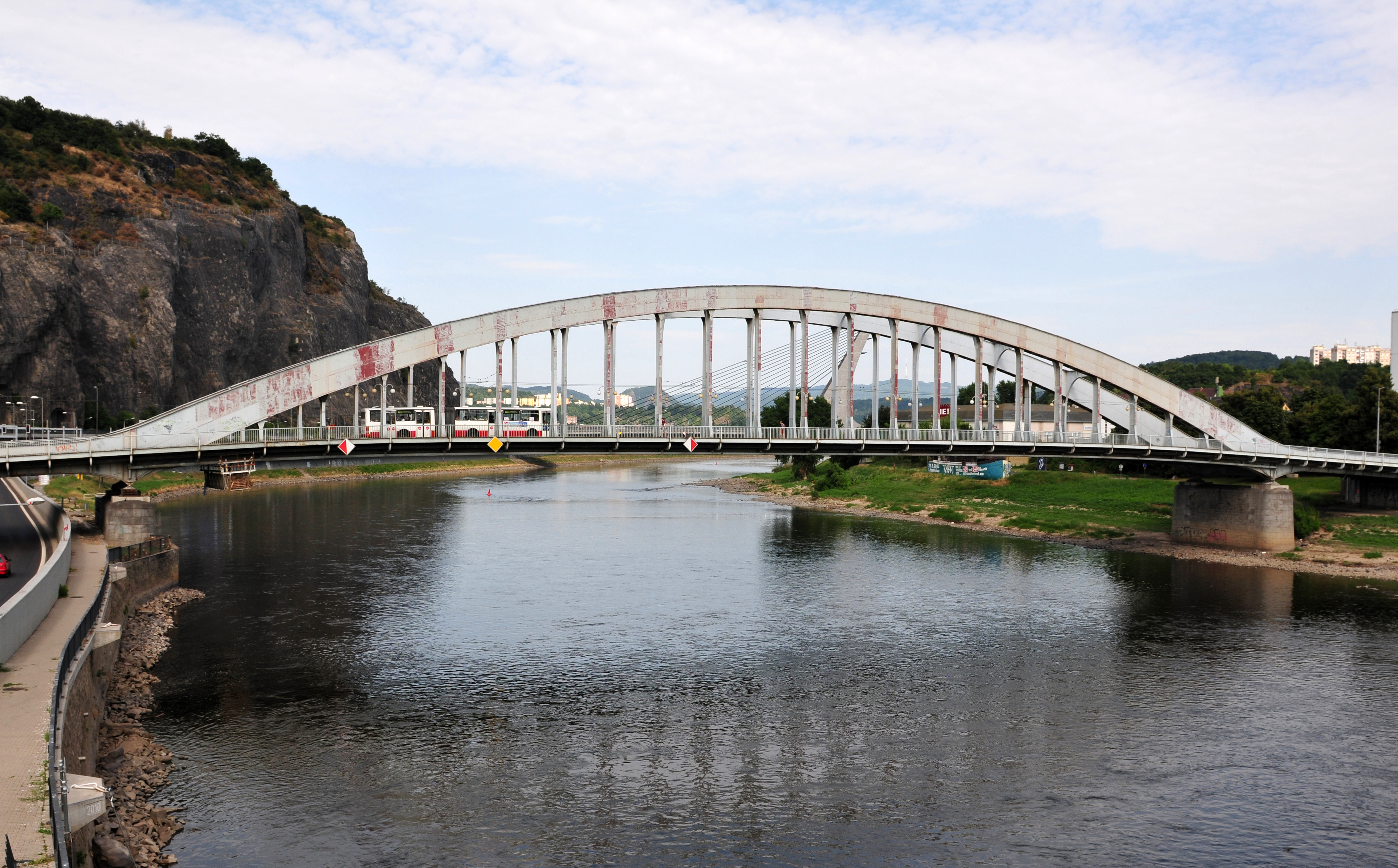 Most Dr. Edvarda Beneše